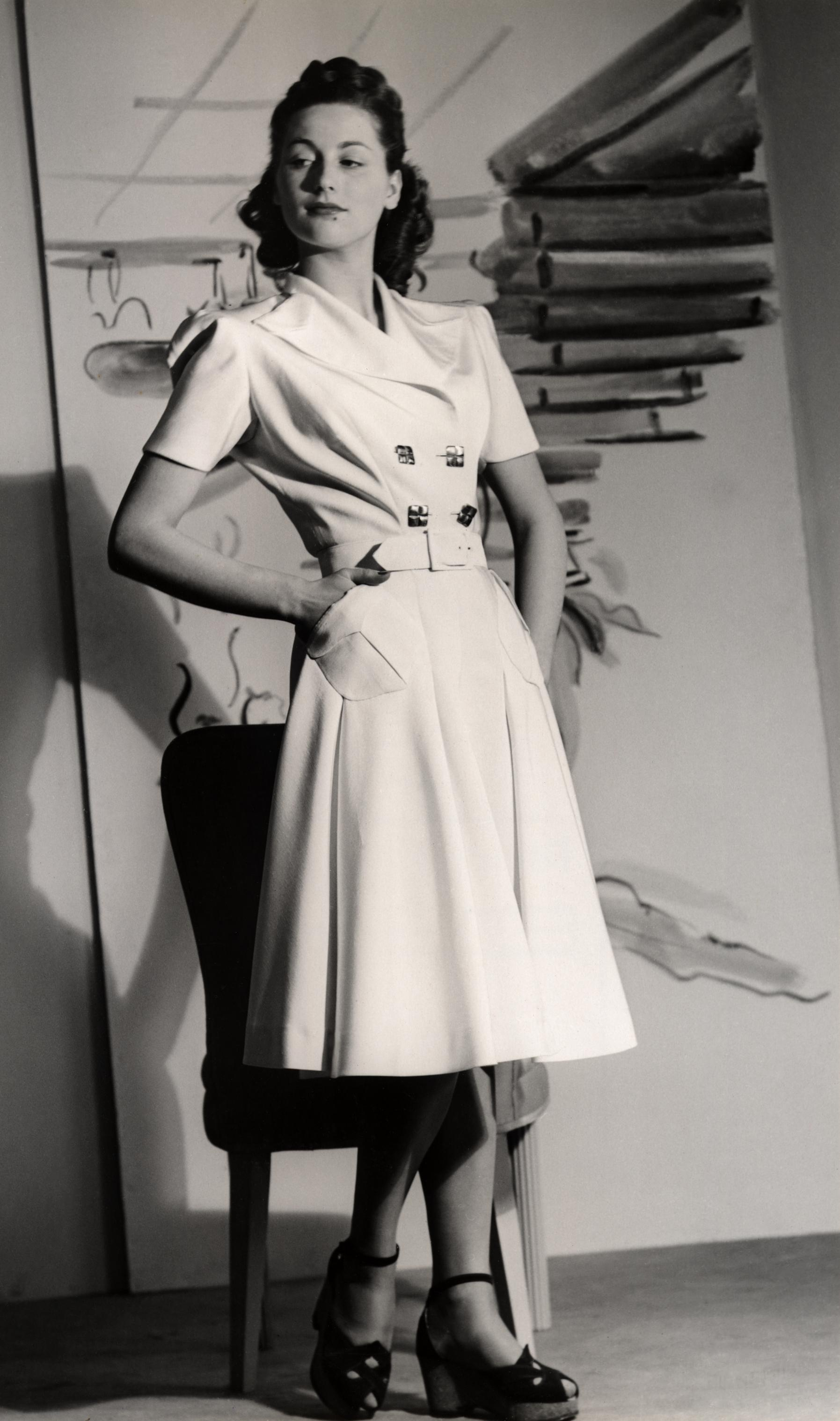 Nordiska Kompaniet visar dammode. Modell i klänning med dubbelknäppning och platåsandaler med korksula. Ämnesord: Kläder, Kvinna, Mode.